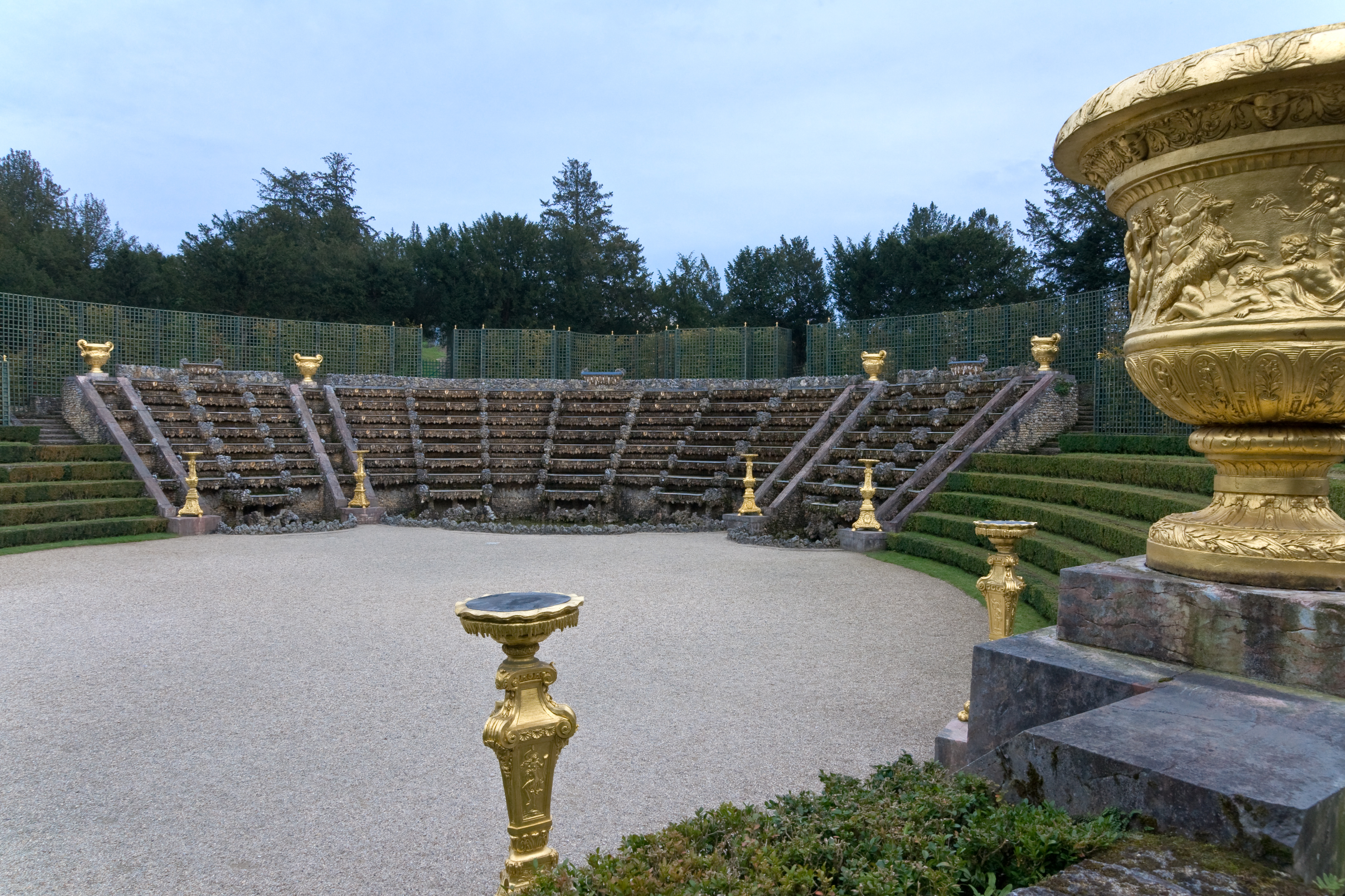 Bosquet de la Salle de Bal, dans le parc du Château de Versailles